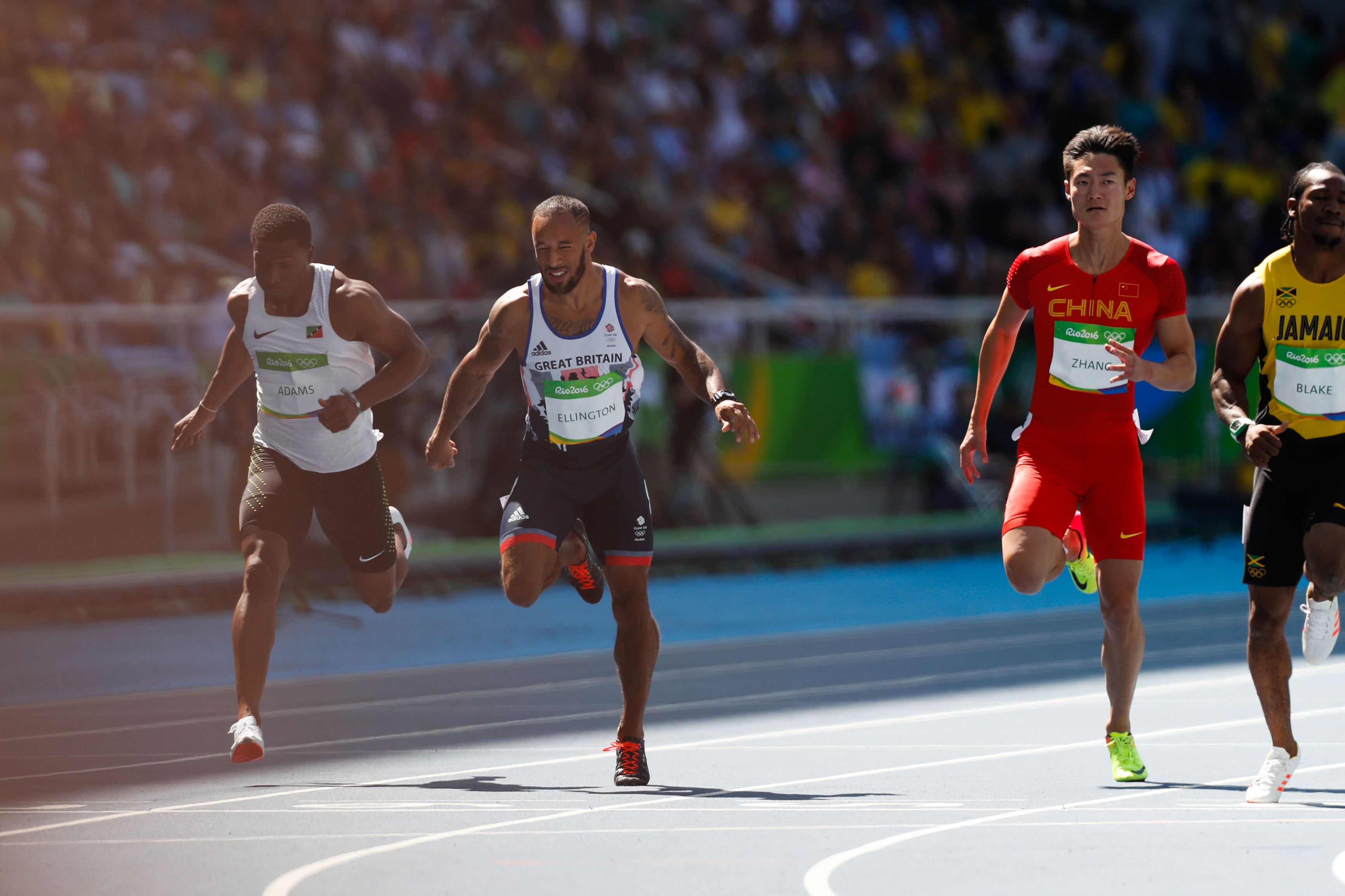 Men's 100 m sprint heats